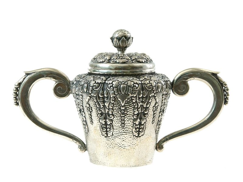 Servies (onderdeel). De zilverwerkplaats van Sastro Sarjono (SS) is gevestigd in Kota Gede, een stad van zilversmeden bij Yogyakarta. De werkplaats bestaat nog (2005).. Zilveren suikerpot behorende bij een theeservies